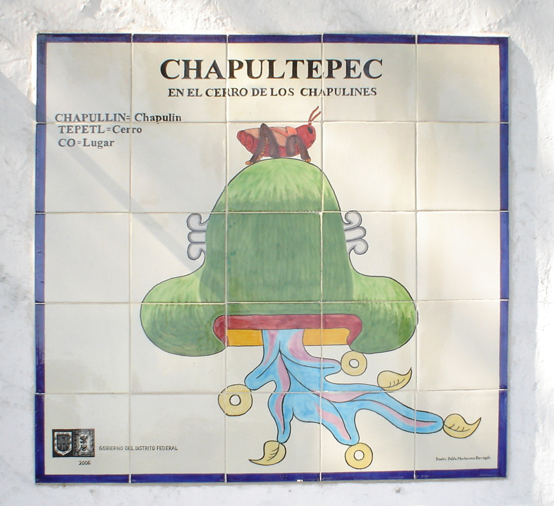 SIGNIFICADO DE CHAPULTEPEC